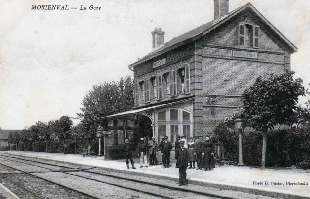 La gare de Morienval ; le personnel pose pour le photographe.